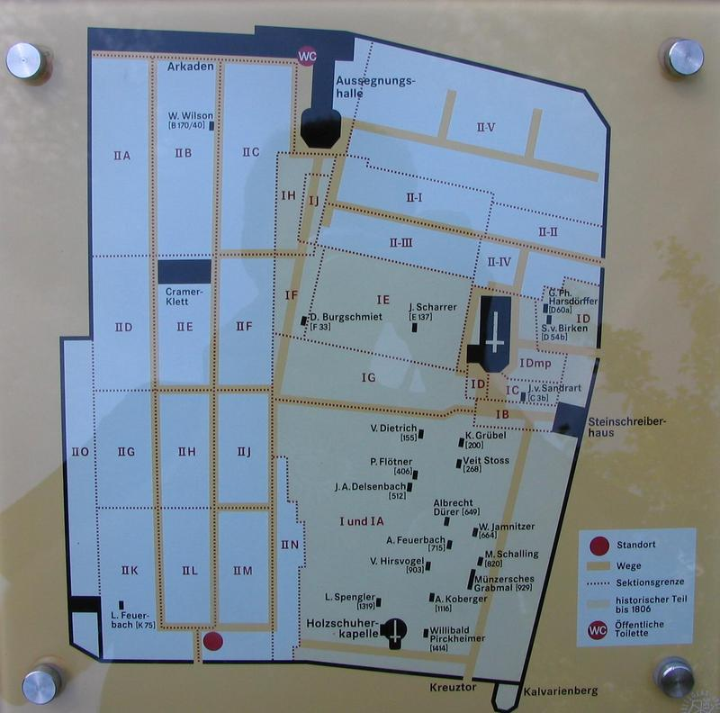 Lageplan des Nürnberger Johannisfriedhofs